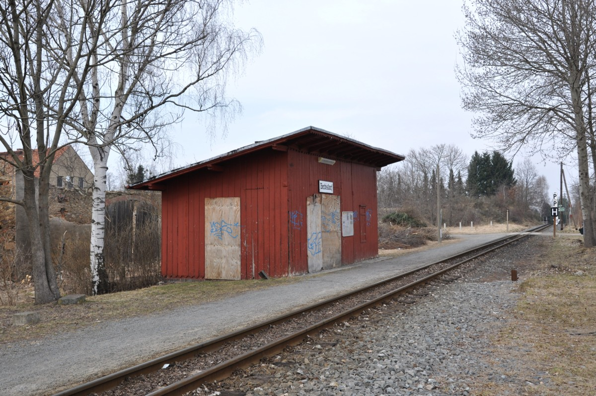 Haltepunkt Berbisdorf der Lößnitzgrundbahn